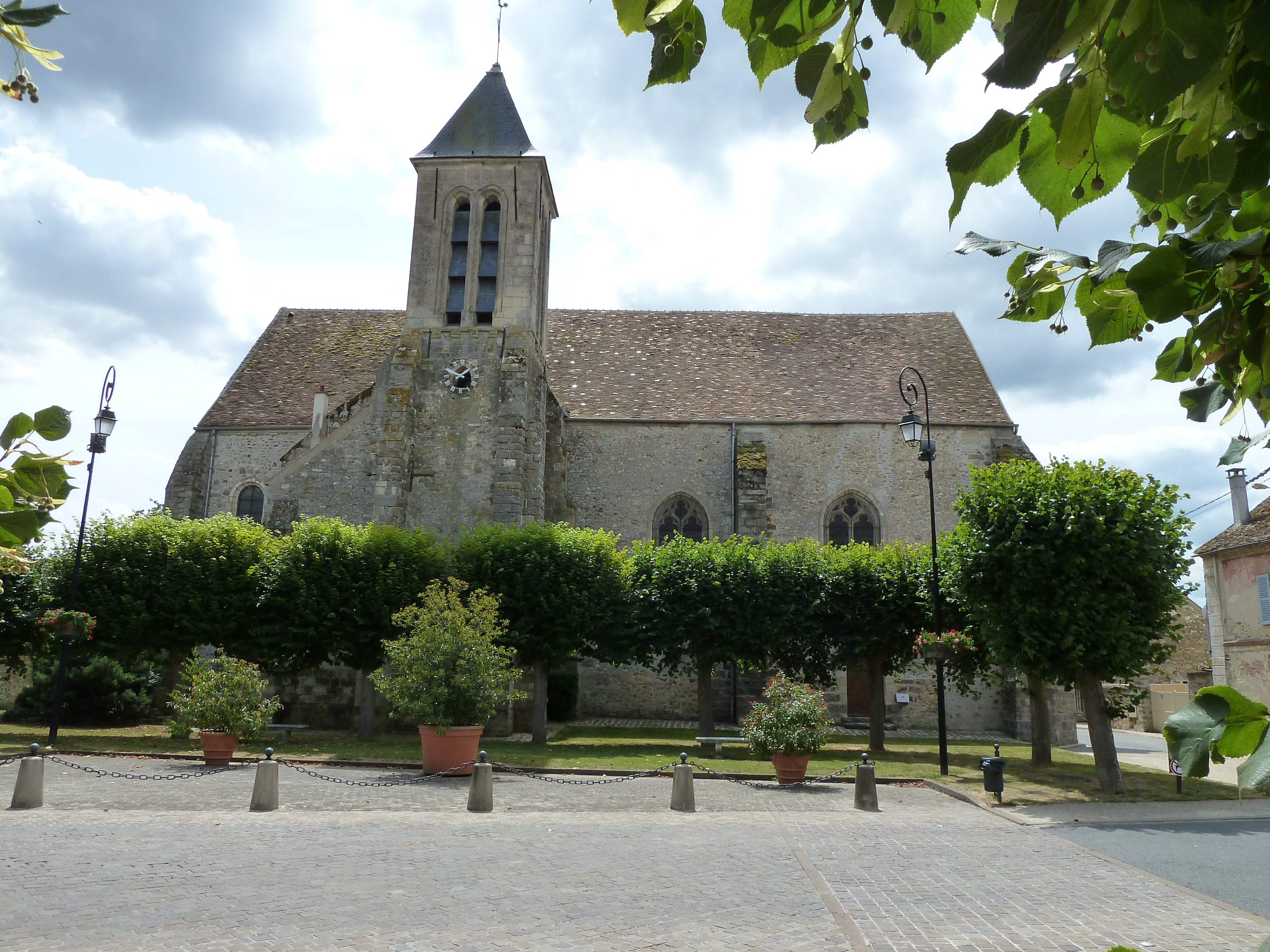 Du nom du patron des viticulteurs, Saint-Vincent, qui sont très nombreux dans la commune au XIXe siècle.